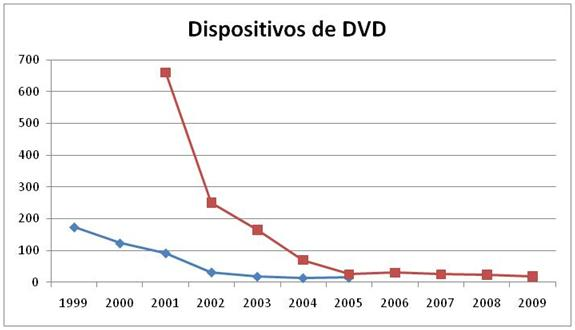 Evolución de los precios de los dispositivos de DVD